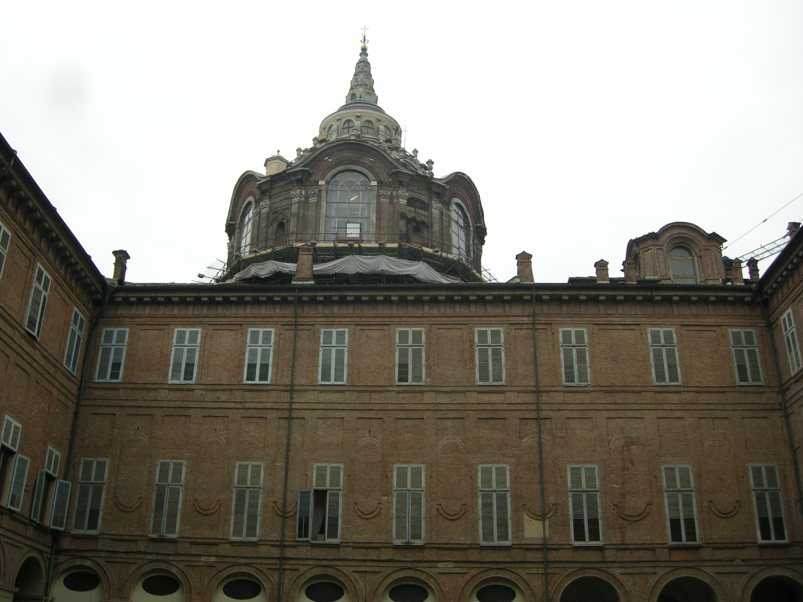 Cappella della sindone vista dal cortile di palazzo reale